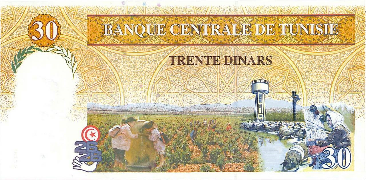 20 Tunisian dinar (obverse)